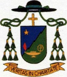 Stemma episcopale di Monsignor Alberto Ablondi